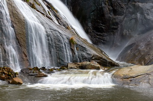 Fervenza do río Xallas en Ézaro